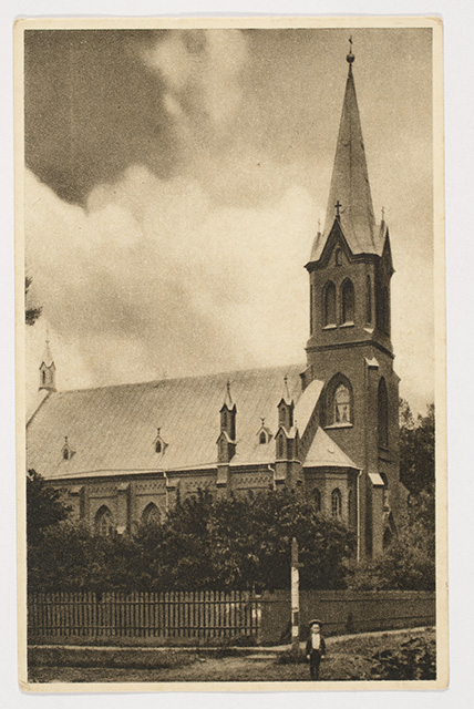 Muuseumikogu Fotokogu Muuseumikogu Fotokogu legend Narva-Jõesuu Nikolai kirik (1900) - hävinud 1944